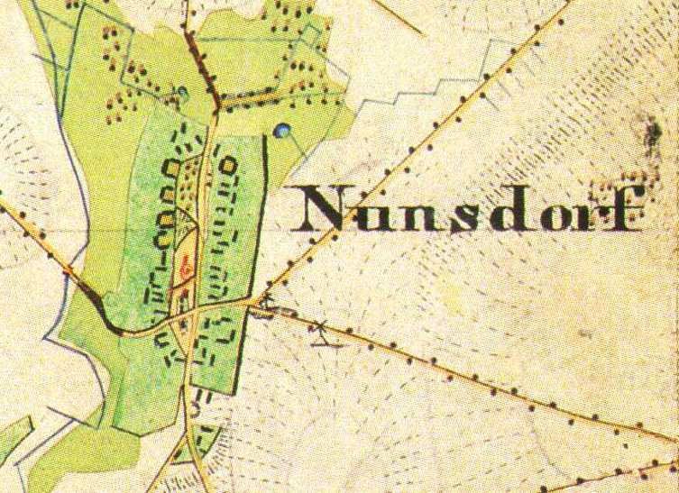 Nunsdorf auf dem Urmesstischblatt, 1:25000, Blatt Trebbin (Nr.3745) von 1840, Nunsdorf, Ortsteil von Zossen, Brandenburg, Deutschland